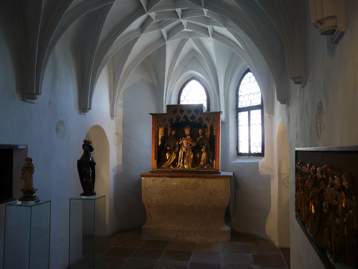 Hohensalzburg Castle, Salzburg, Austria